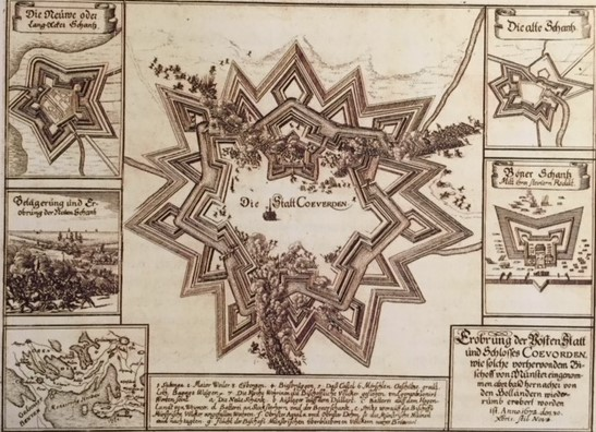 Duitstalige nieuwskaart van de verovering van Coevorden door Staatse troepen in december 1672